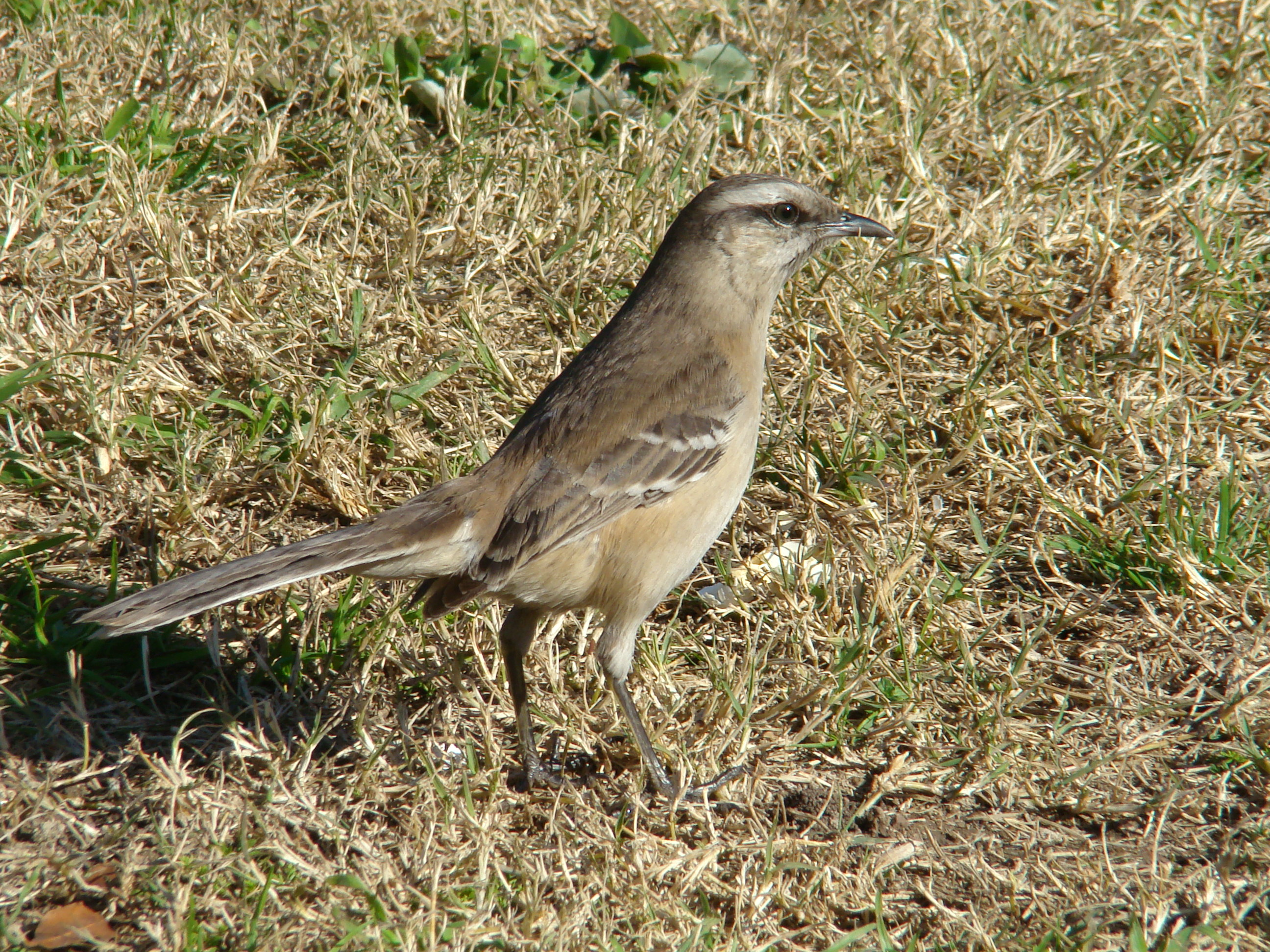 calandria - Mimus saturninus